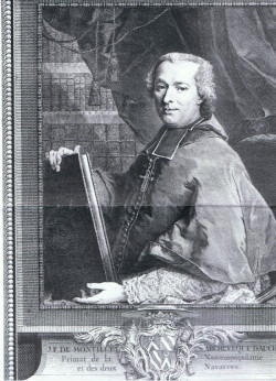 Jean-François de Montillet, archevêque d'Auch, Primat de la Novempopulanie et des deux Navarres